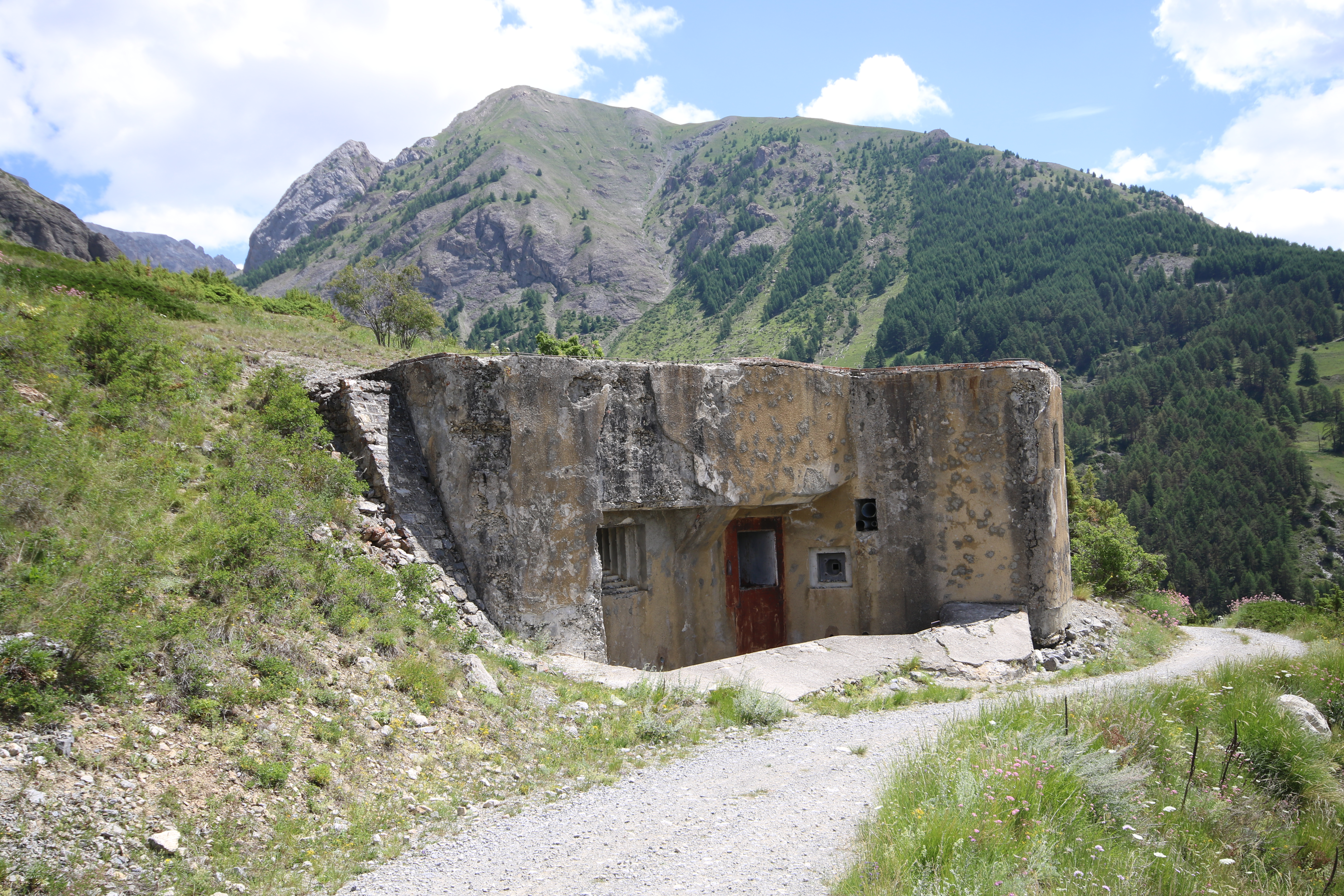 Le bloc 2 de l'ouvrage de Saint-Ours Haut (2)